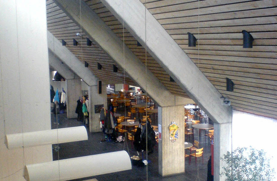 Billede af Thisted Gymnasium og HF-kursus i Thisted set indefra. Billedet viser kantine- og fællesområdet på gymnasiet.